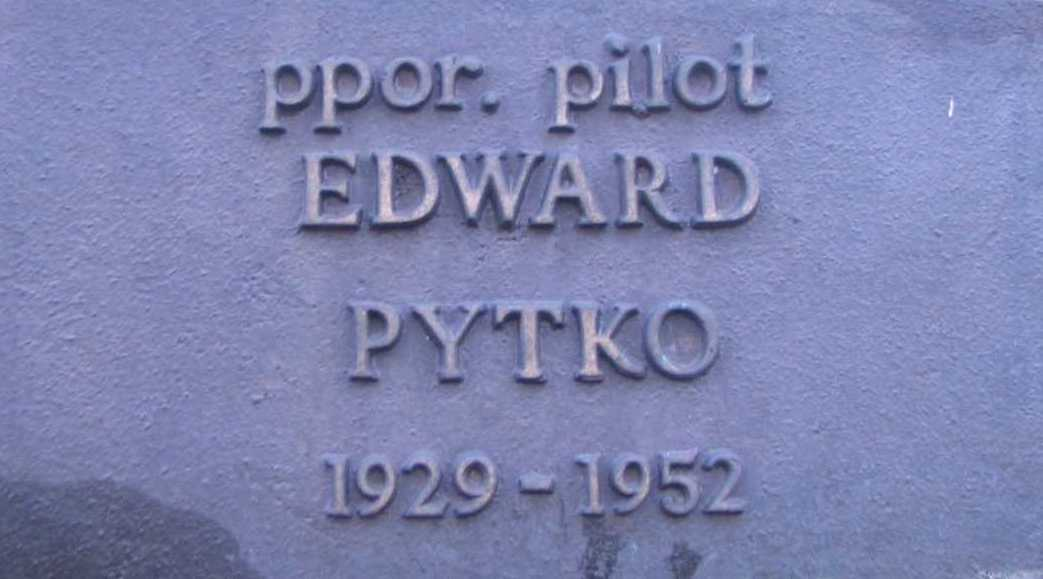 Kwatera na Łączce, tablica pamiątkowa ppor. pil. Edwarda Pytki